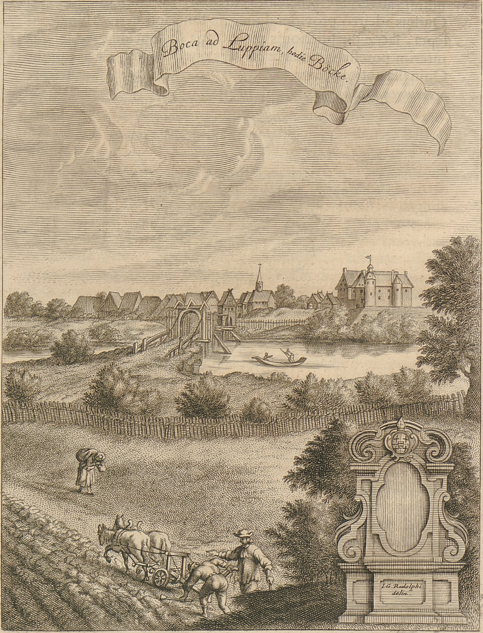 Boke im 17. Jahrhundert